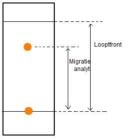 Papierchromatografie